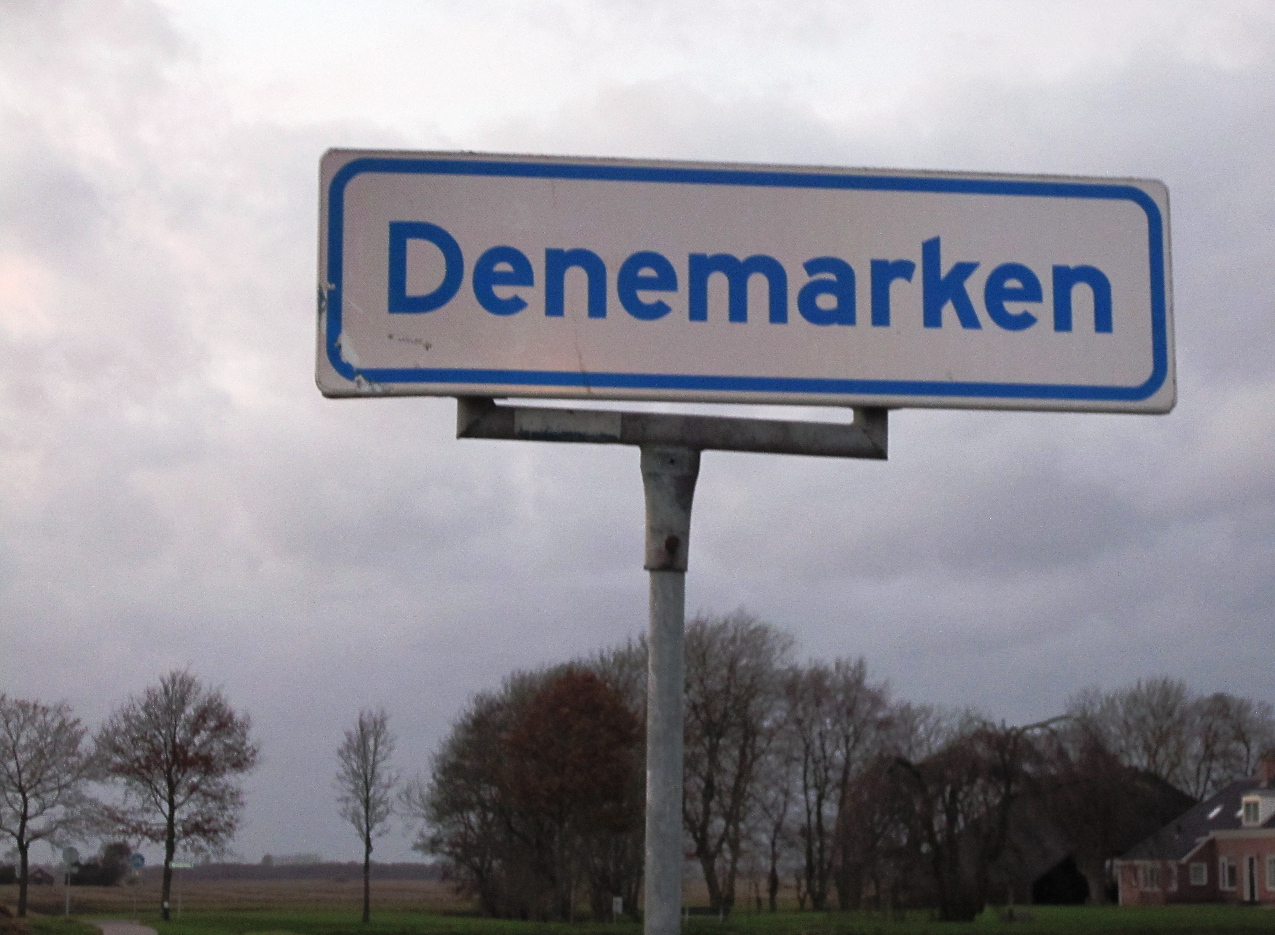 Denemarken - Slochteren - Groningen - Nederland